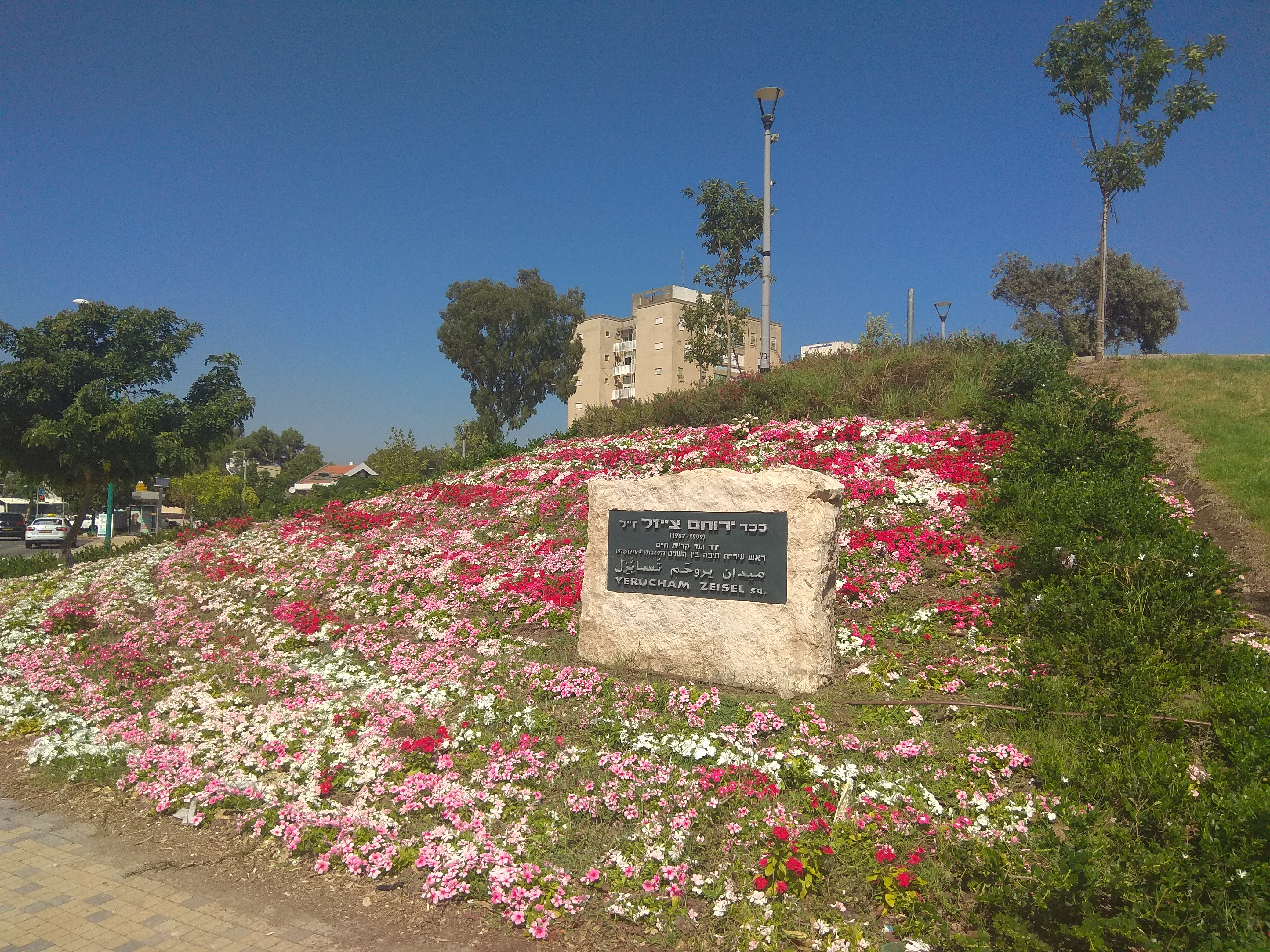 כיכר על שם צייזל